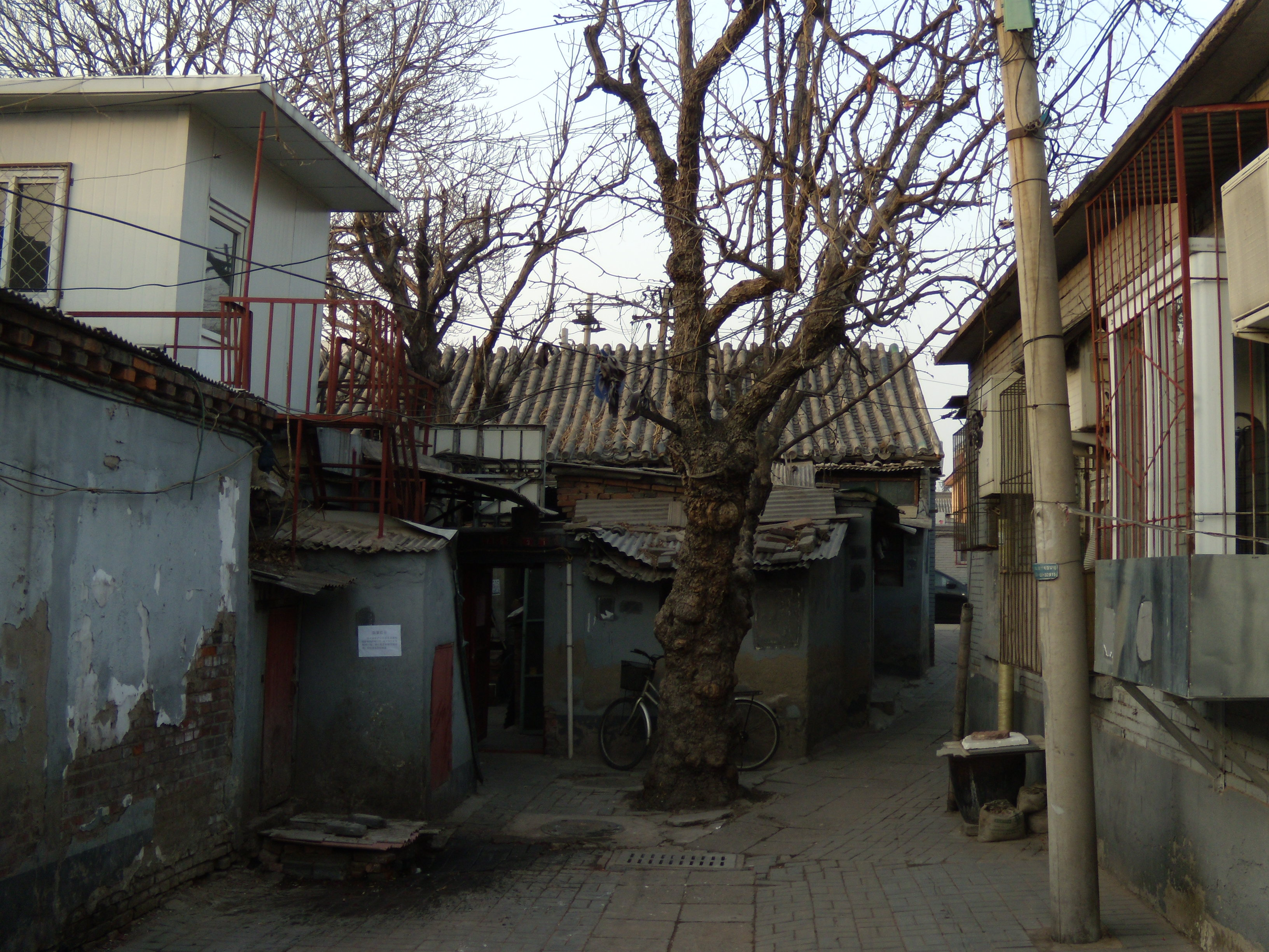 北京护国寺